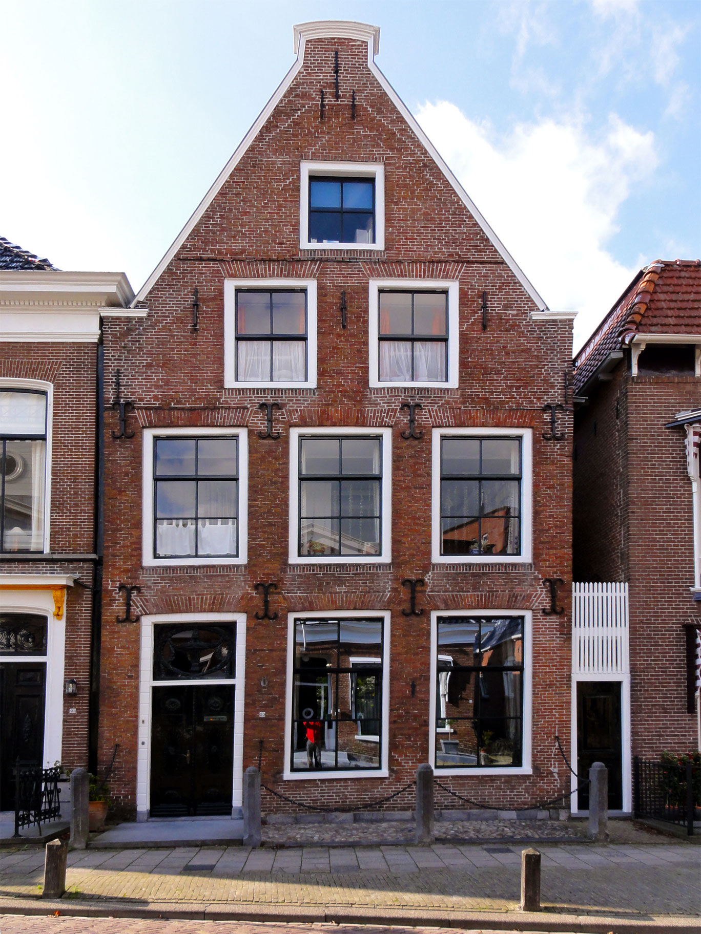 Legeweg 23 Dokkum, rijksmonument